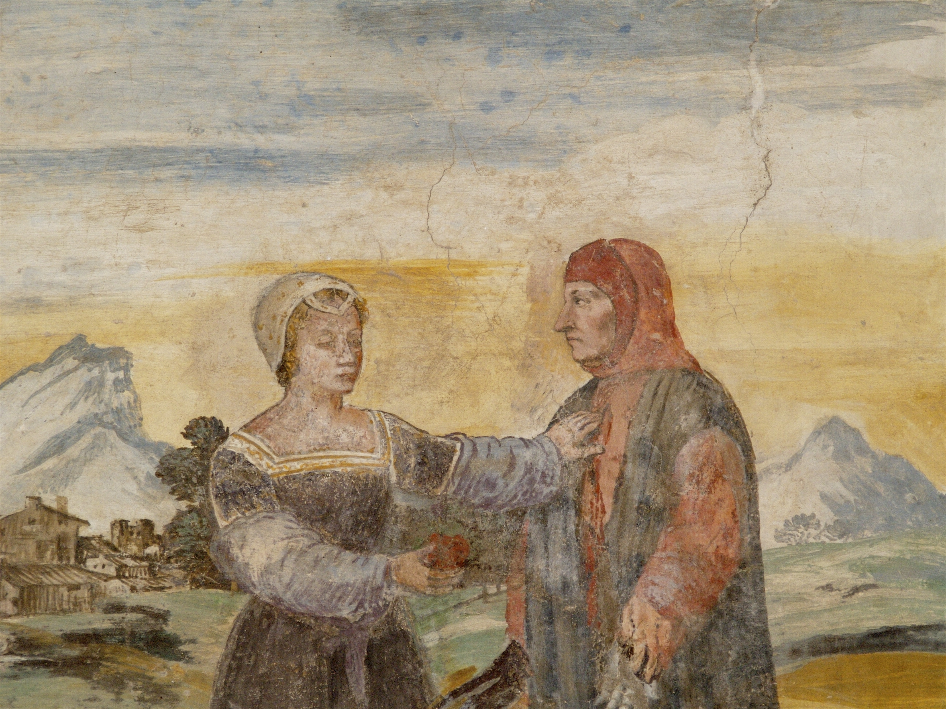 Arquà Petrarca: Petrarca e Laura in un affresco nella casa del Petrarca.